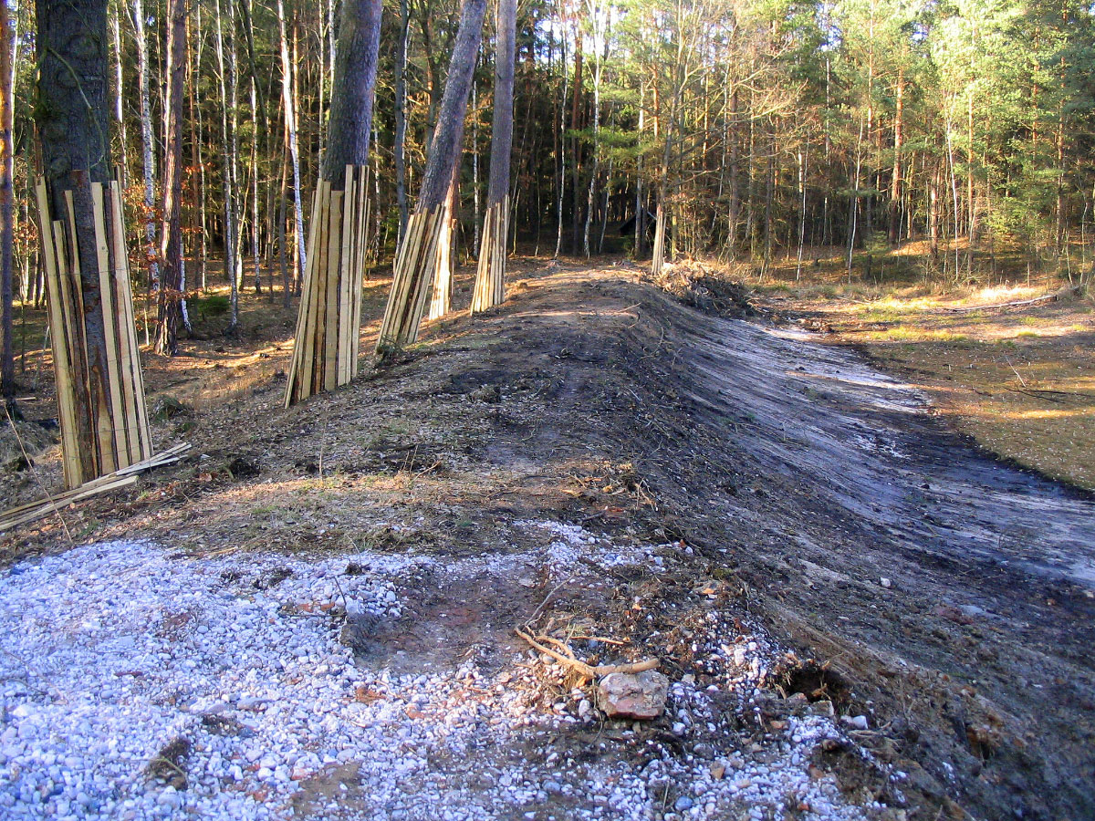 Profil hráze vypuštěného rybníka Vydymáček z bolevecké rybniční soustavy v Plzni v průběhu rekonstrukce hráze.